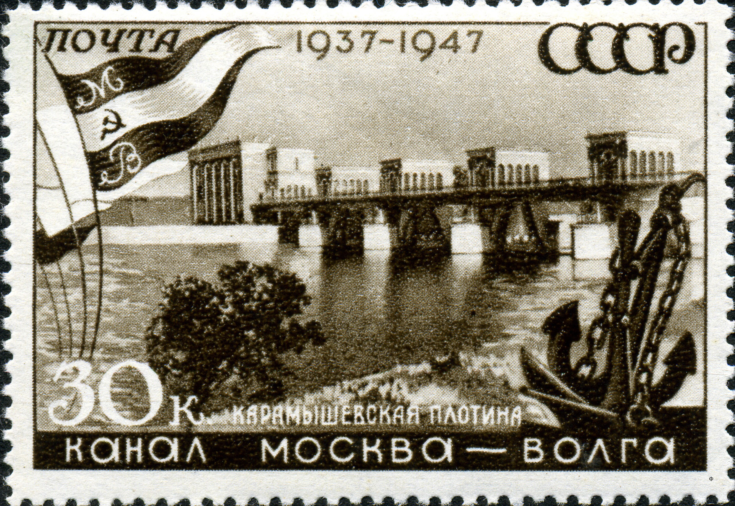 Марка СССР